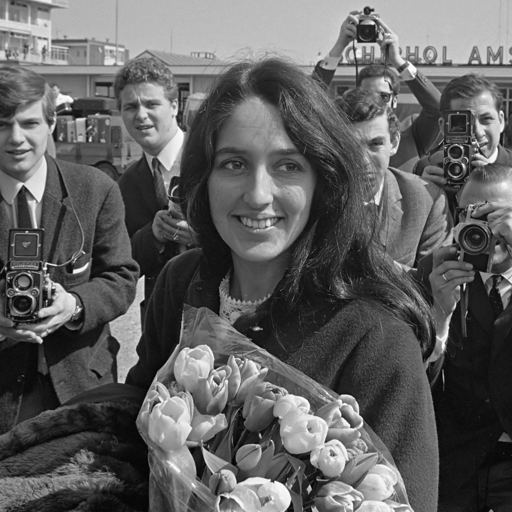 Joan Baez , Amerikaanse zangeres, aankomst op Schiphol 26 april 1966